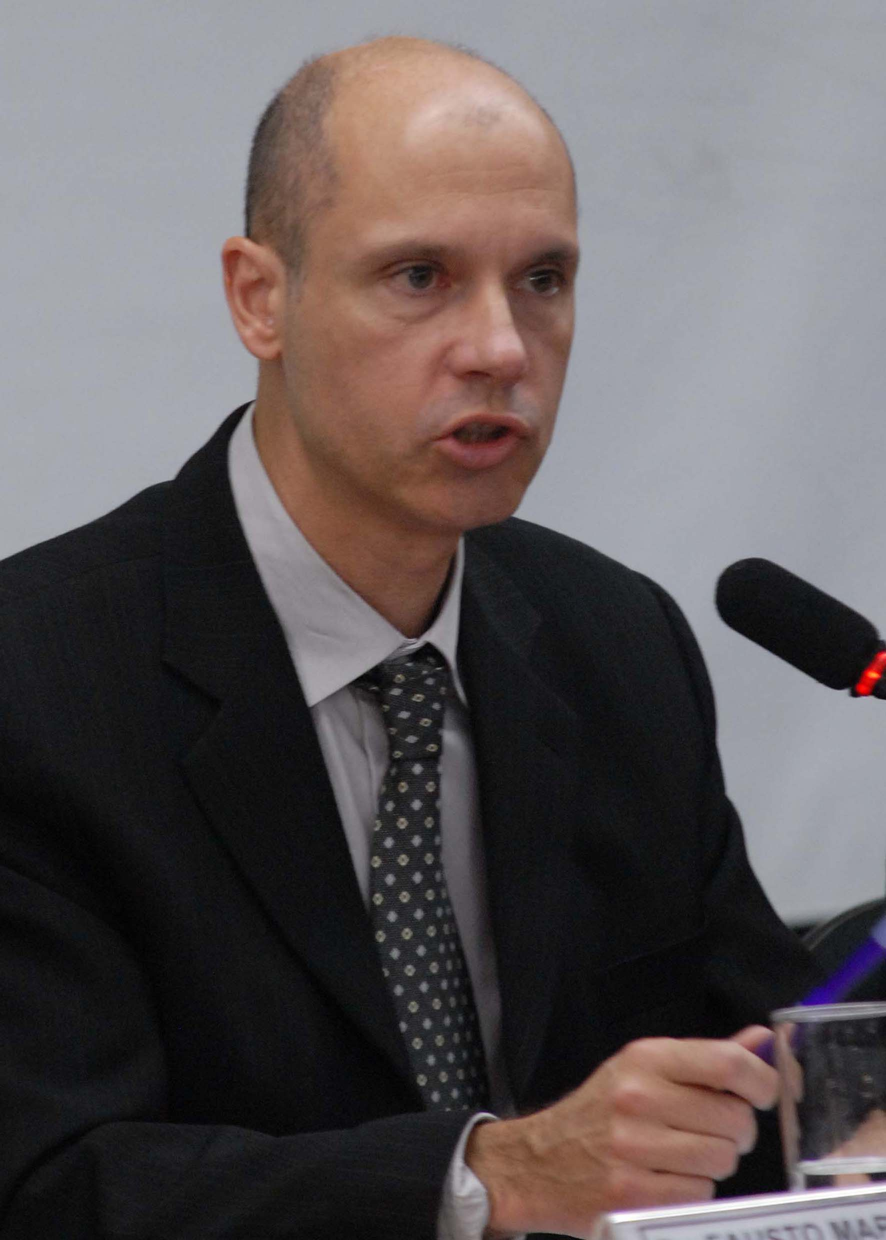 Juiz federal Fausto De Sanctis, responsável pelas prisões da Operação Satiagraha, da Polícia Federal